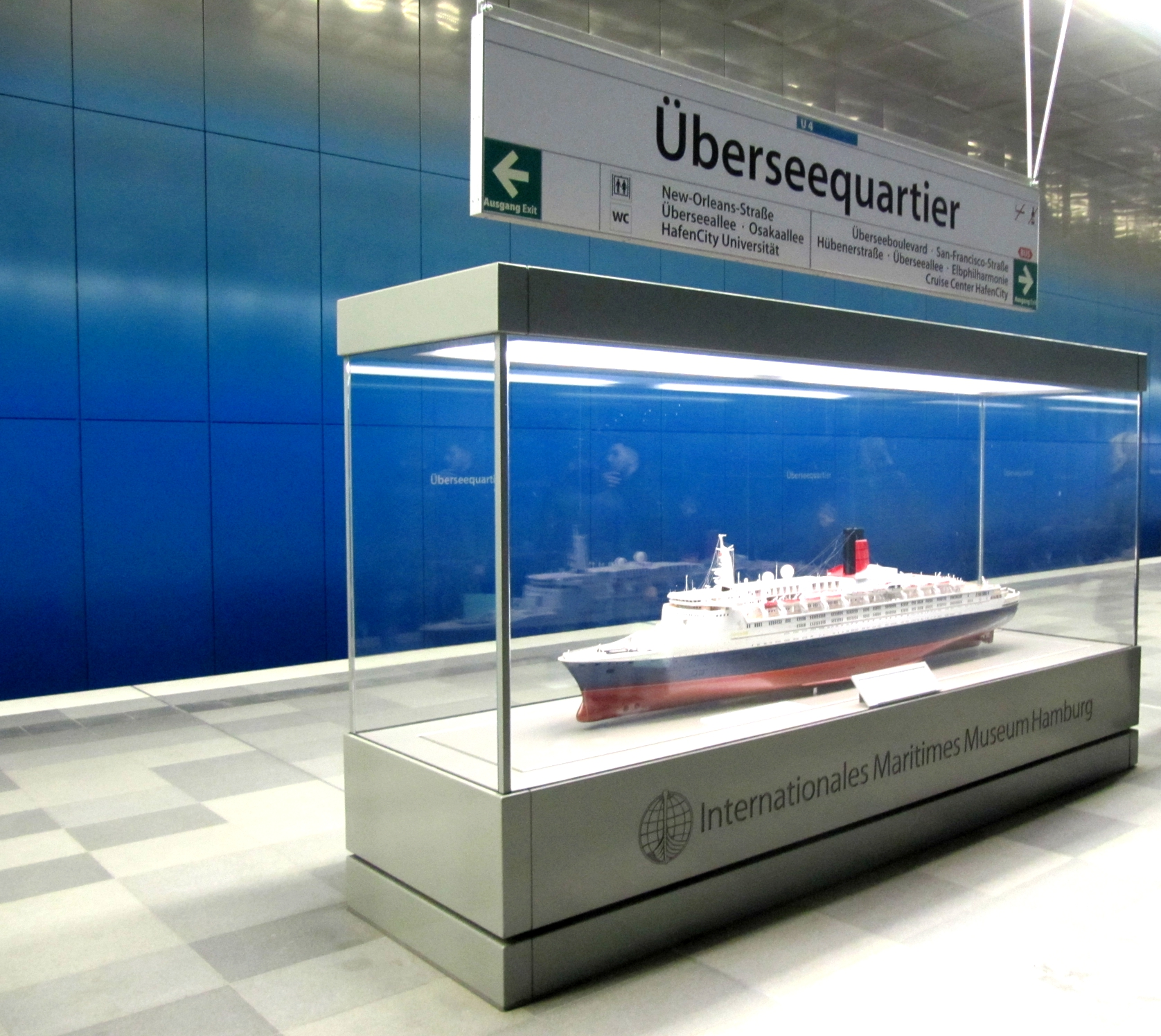 Schiffsmodel im U-Bahnhof Überseequartier